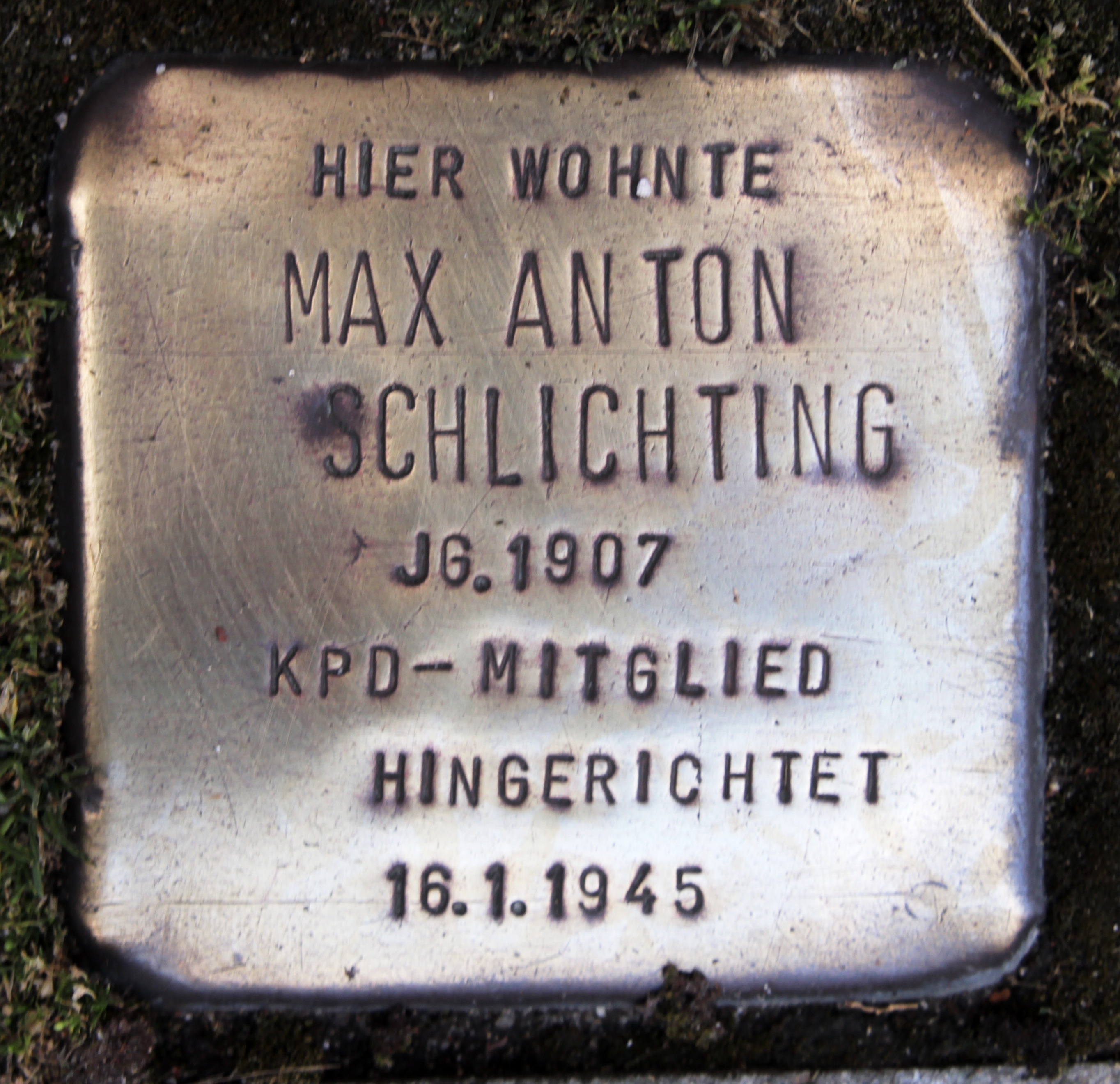 Stolperstein für Max Anton Schlichting Hinterm Graben 11 in Hamburg-Bergedorf am 17. August 2020